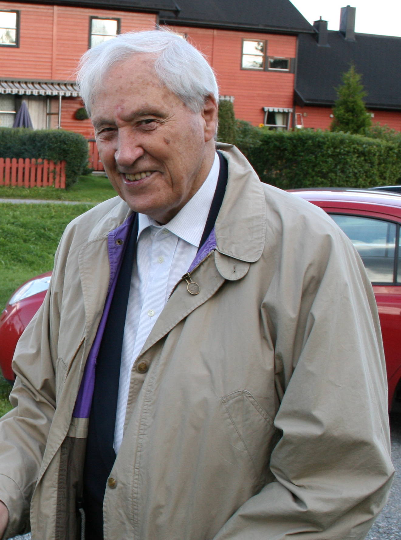 Halfdan Hegtun på "Et historisk møte" på Kløfta i august 2008.